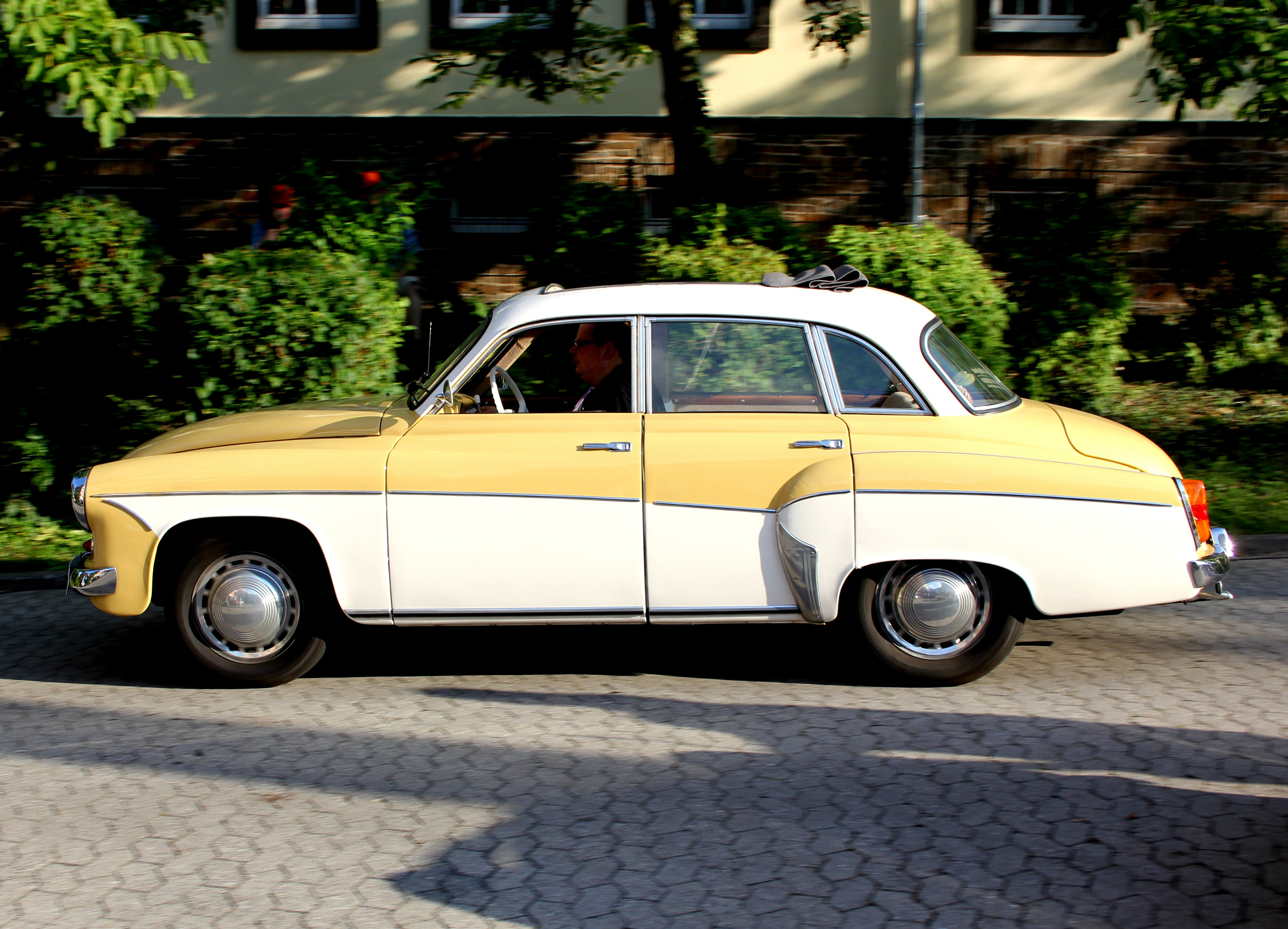 Wartburg 1000, Typ 311-108, Baujahr 1963, bei der Food Rallye in Neuwied